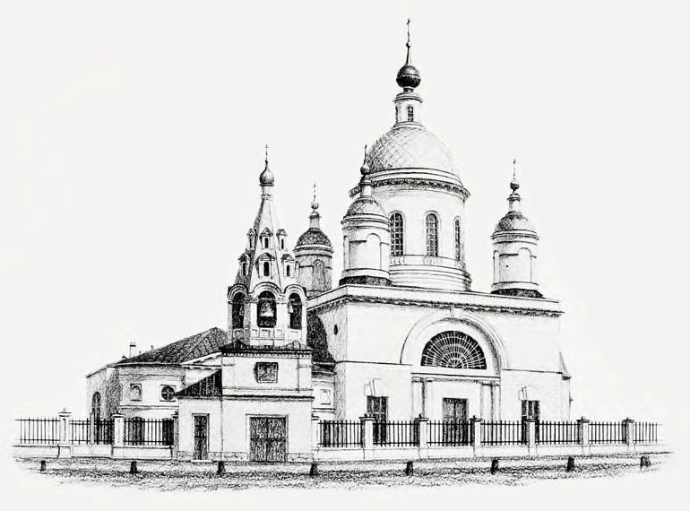 Храм преподобного Сергия Радонежского (Троицы Живоначальной) в Рогожской слободе, что в Гонной. Рисунок 1840-х годов.